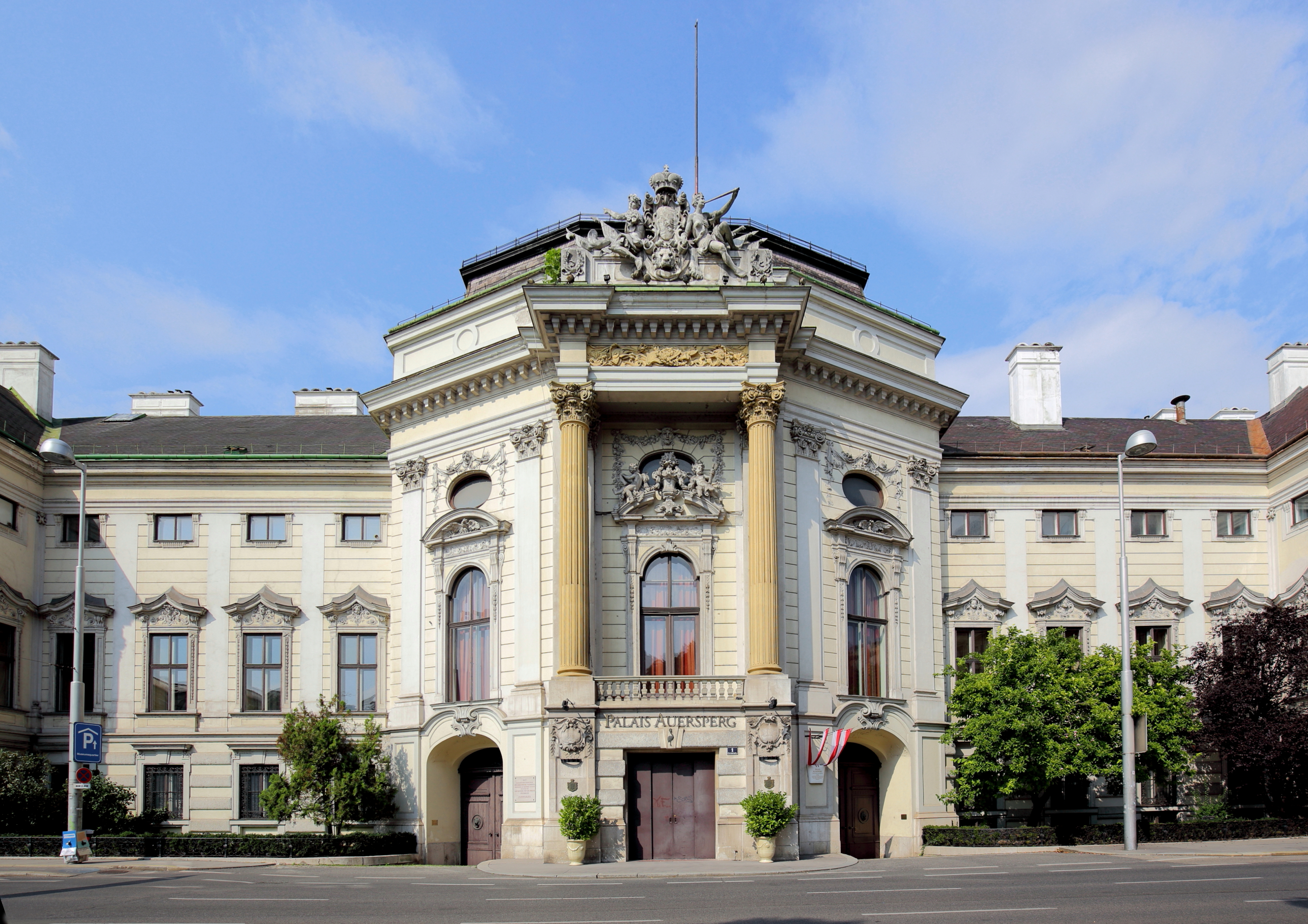 Mittelrisalit des Palais Auersperg in der österreichischen Bundeshauptstadt Wien. Um 1721 wurde vom Baumeister Johann Christian (Giovanni Christiano) Neupauer das vorhandene Gebäude umgebaut; unter anderem wurde dabei vermutlich der dreiseitige Mittelrisalit vorgesetzt.